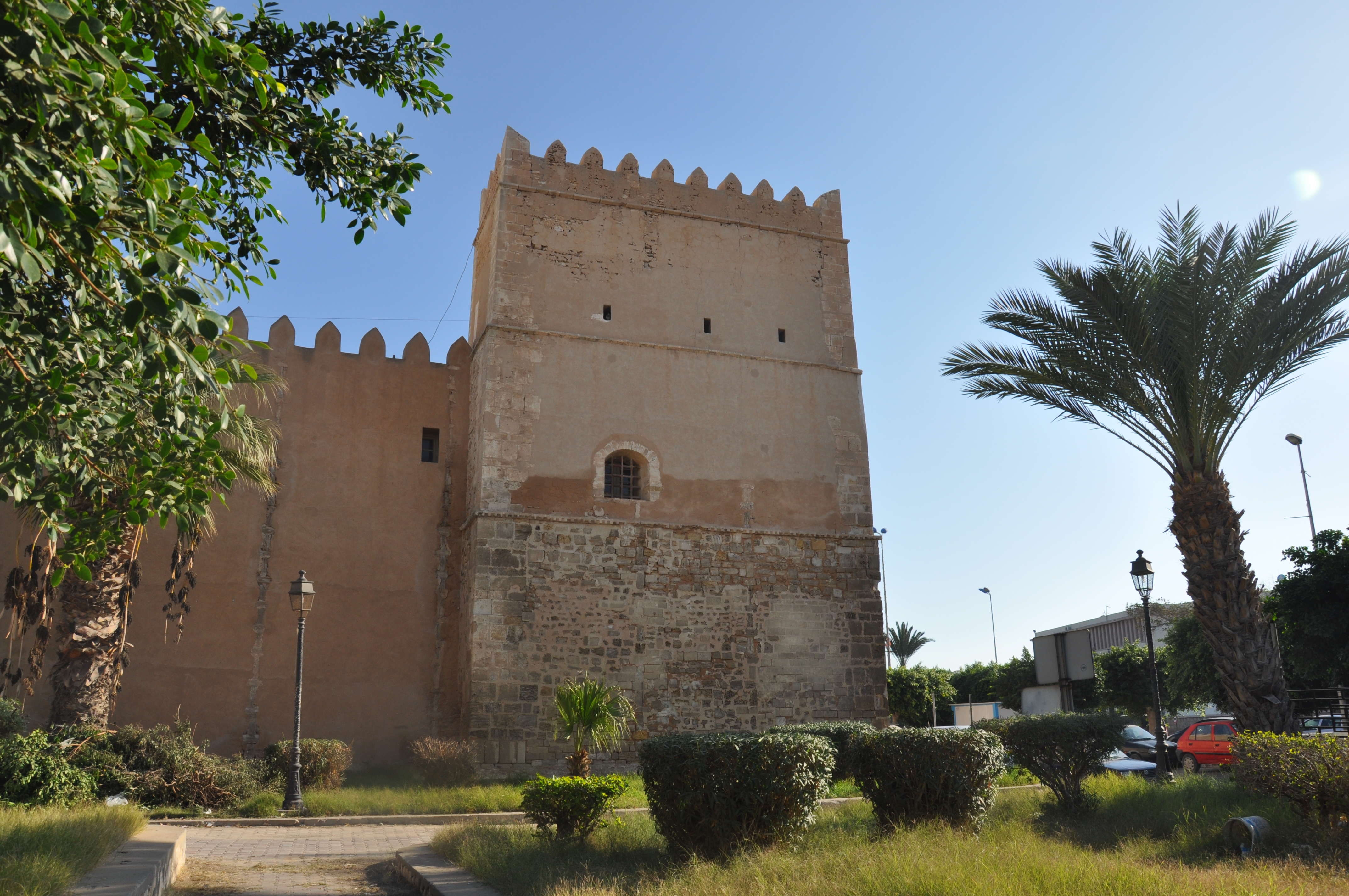 Remparts